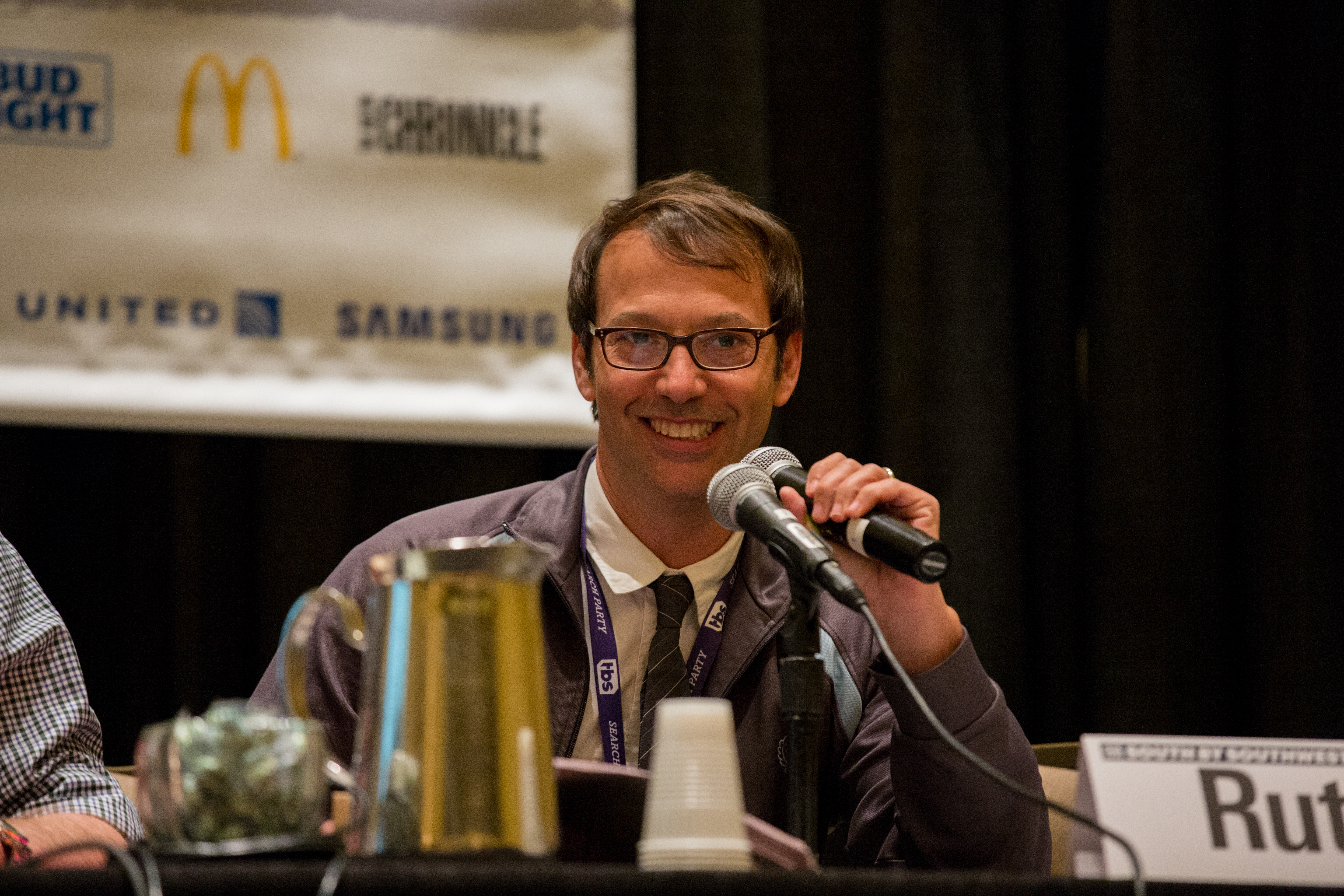 Jim Rutenberg